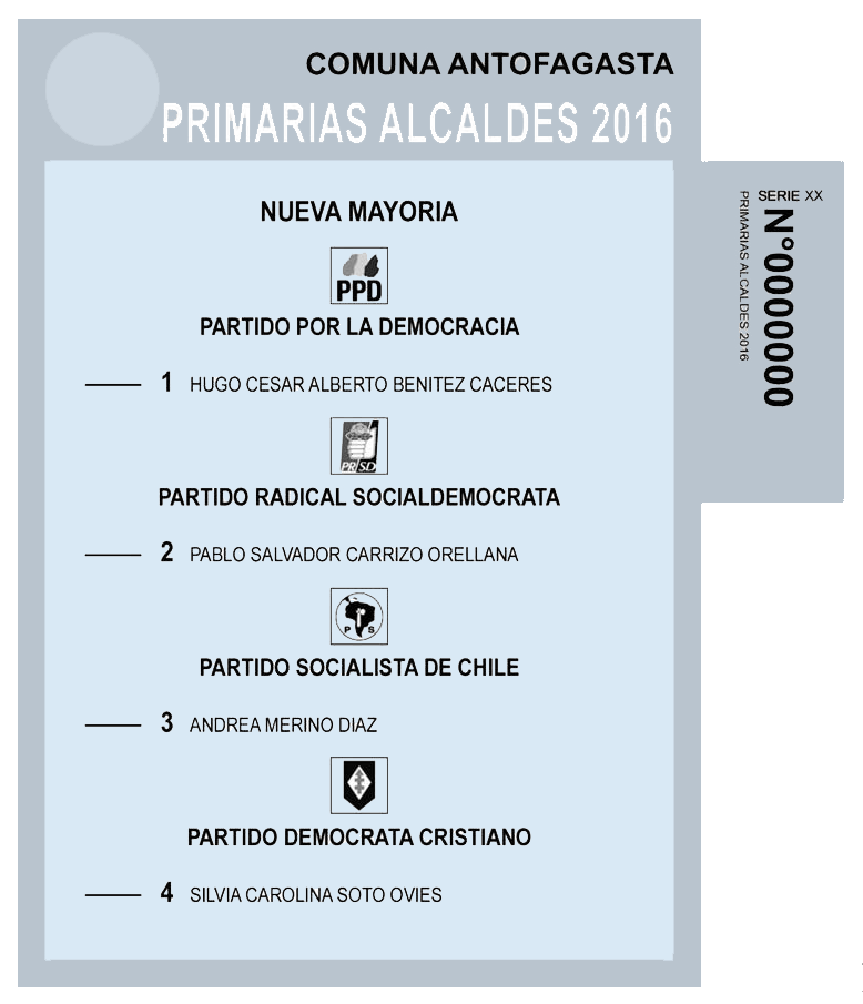 Facsímil de la cédula de votación para las primarias de alcaldes de la Nueva Mayoría en Antofagasta en 2016.